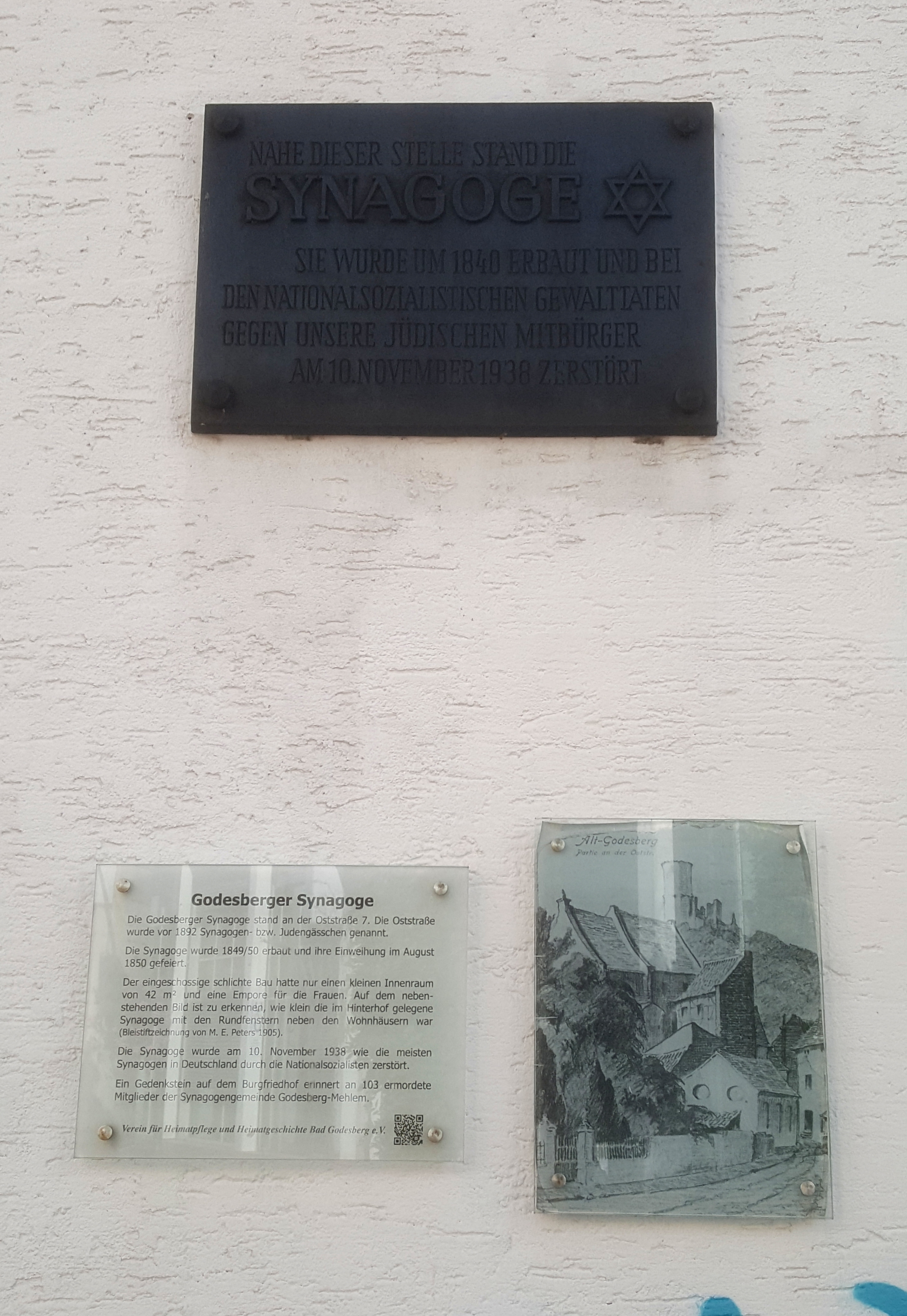 Informations- bzw. Gedenktafeln zur ehemaligen Godesberger Synagoge, Oststraße (ehemals Nr. 7), Bonn-Bad Godesberg (Ortsteil Alt-Godesberg)